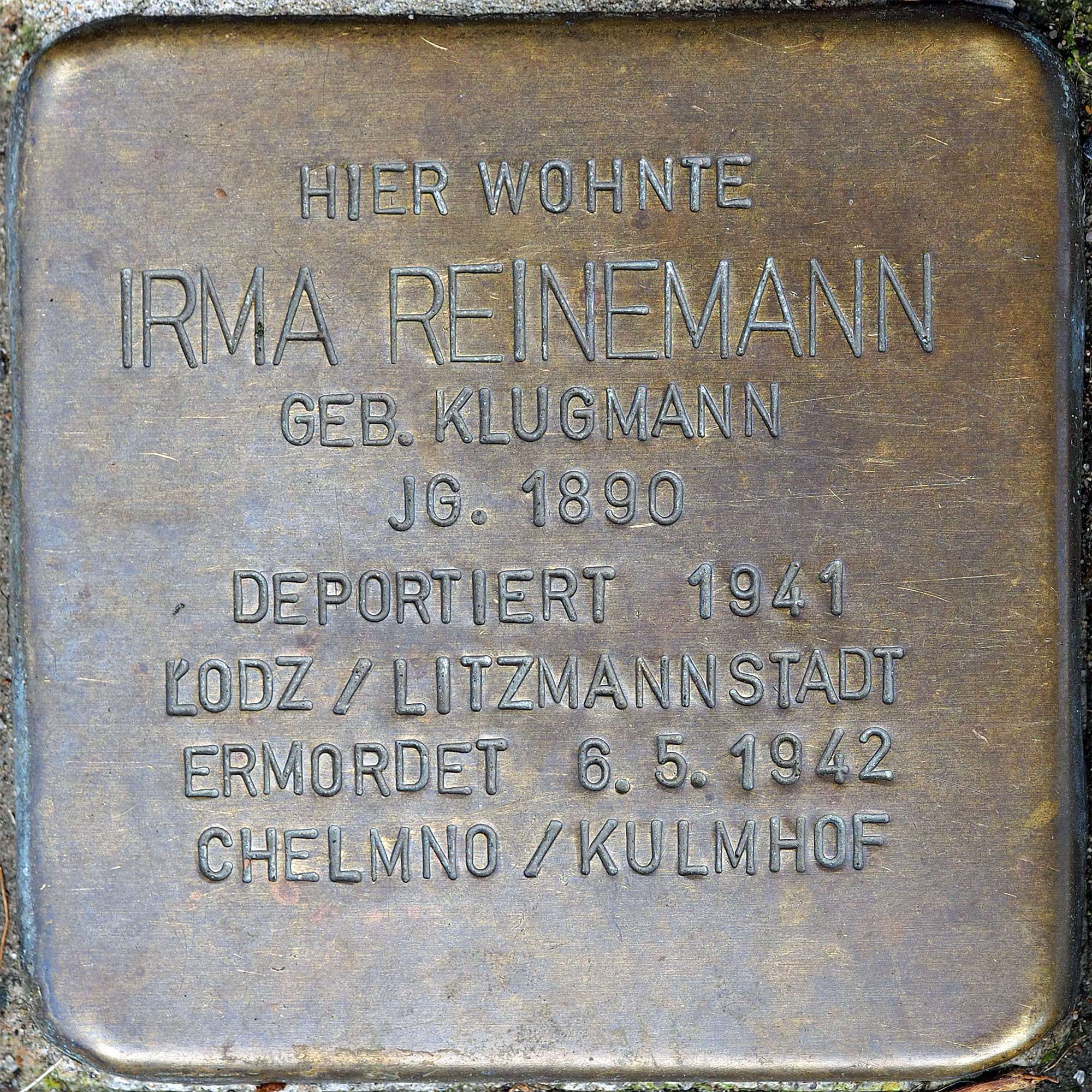 Stolpersteine MG: Reinemann, Irma